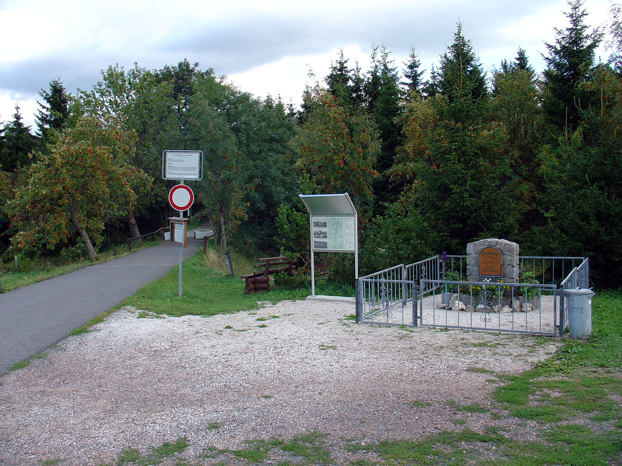 Gedenktafel und -Stein (Sudetendörfer) am Grenzübergang Fürstenau (memorial stone for ruined Sudeten German villages)